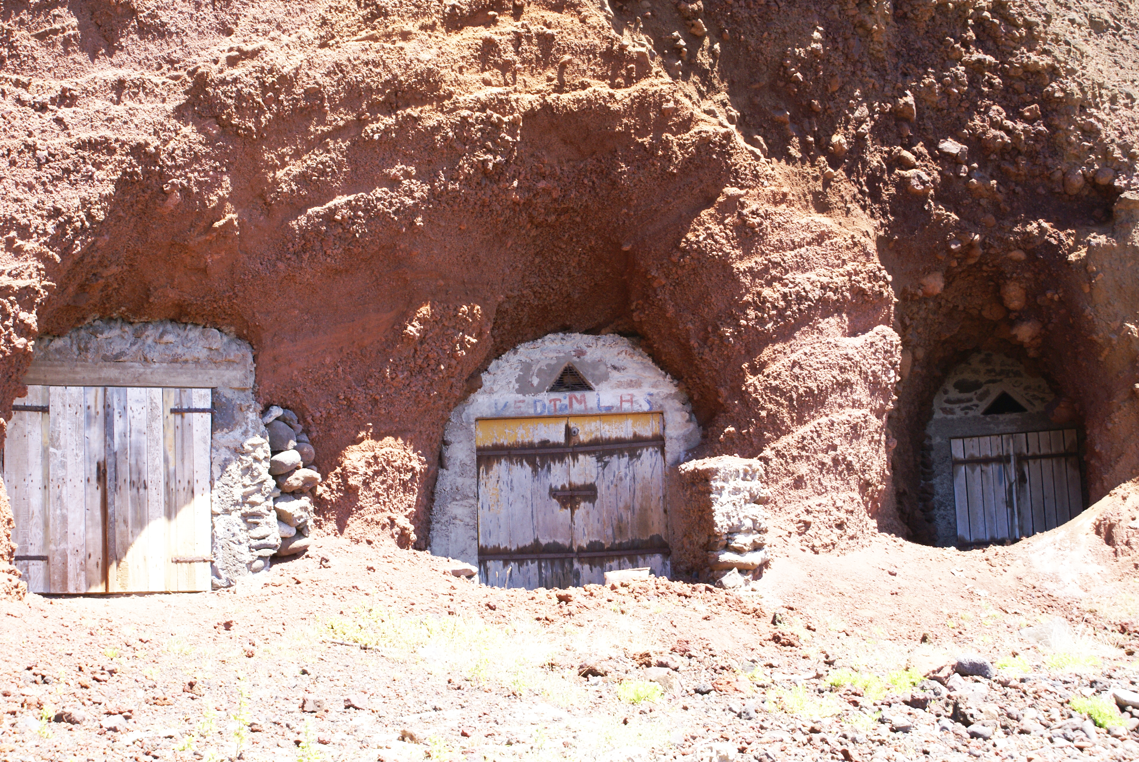 Porto Afonso, Casas de abrigo para barcos, Santa Cruz da Graciosa, ilha Graciosa, Açores, Portugal